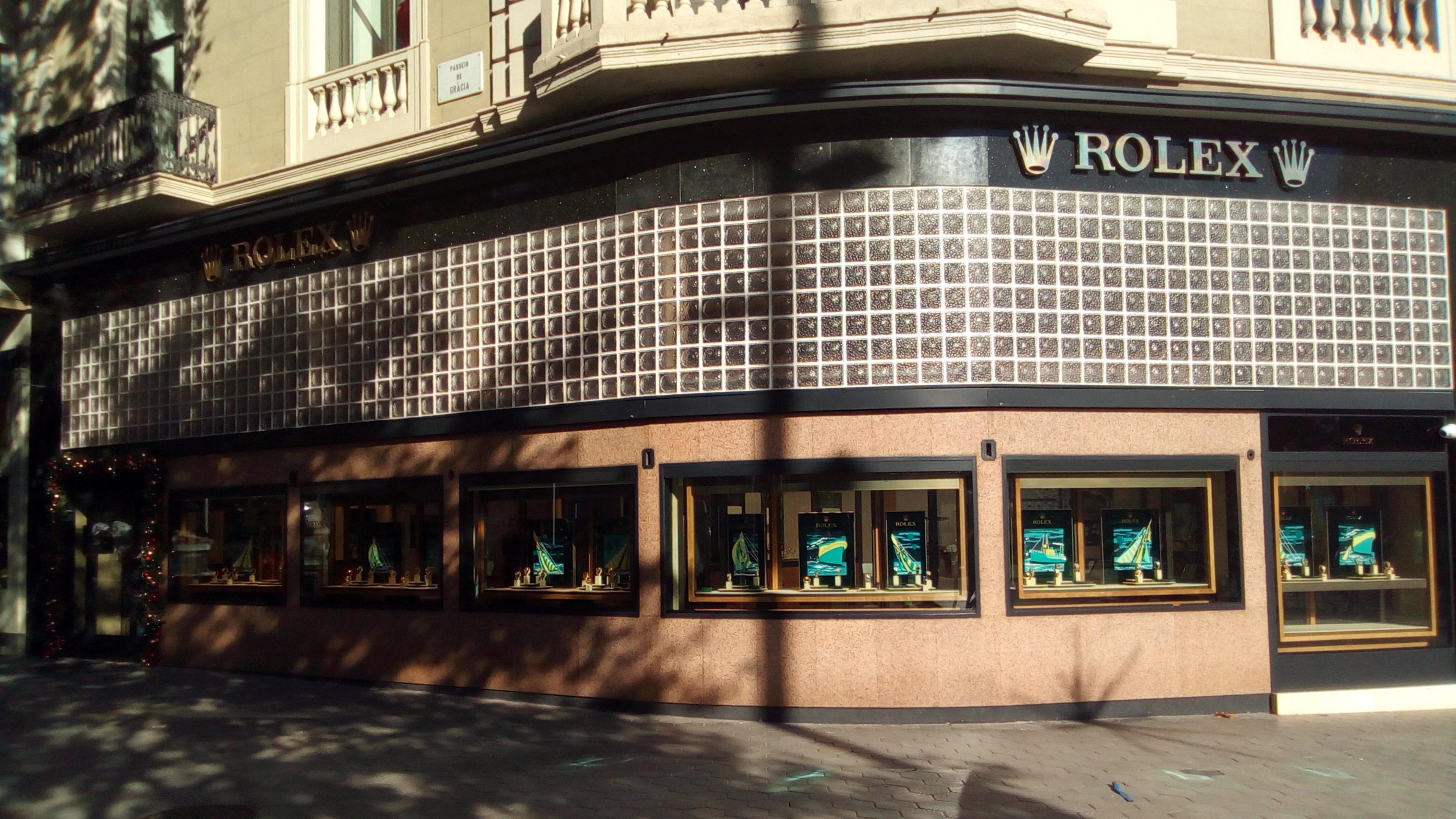 Joyería Roca (1934), de Josep Lluís Sert y Antoni Bonet i Castellana, paseo de Gracia 18, Barcelona.